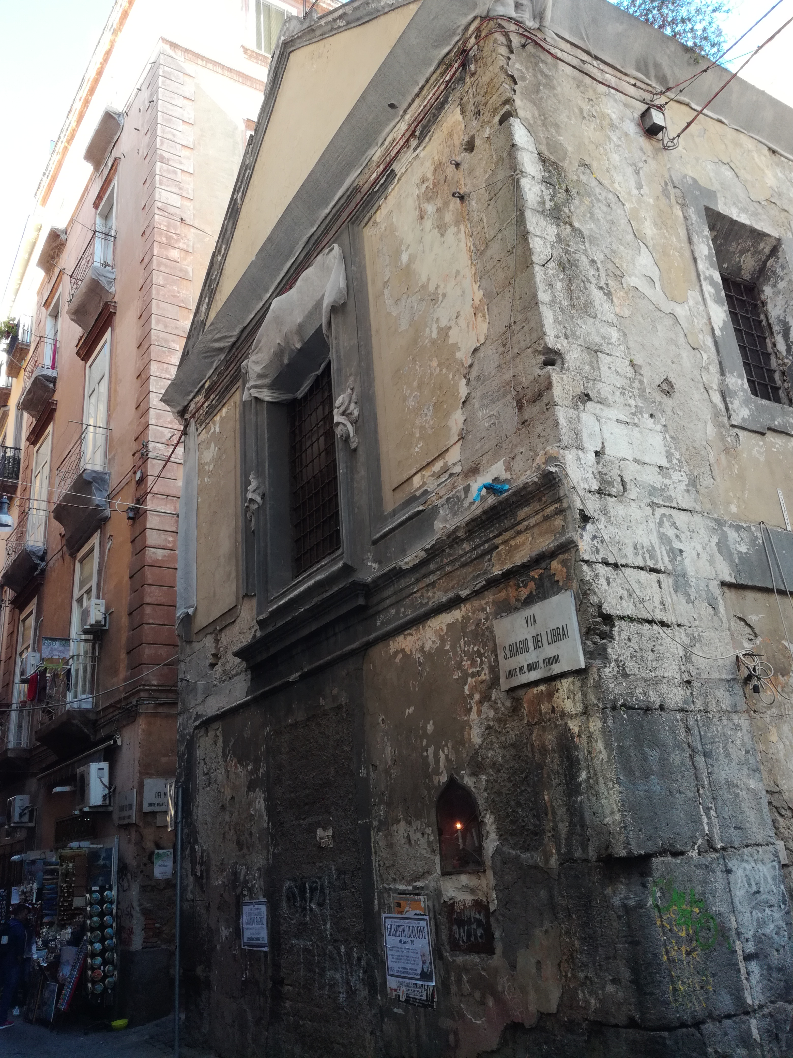 Chiesa a Via Tribunali (Napoli)